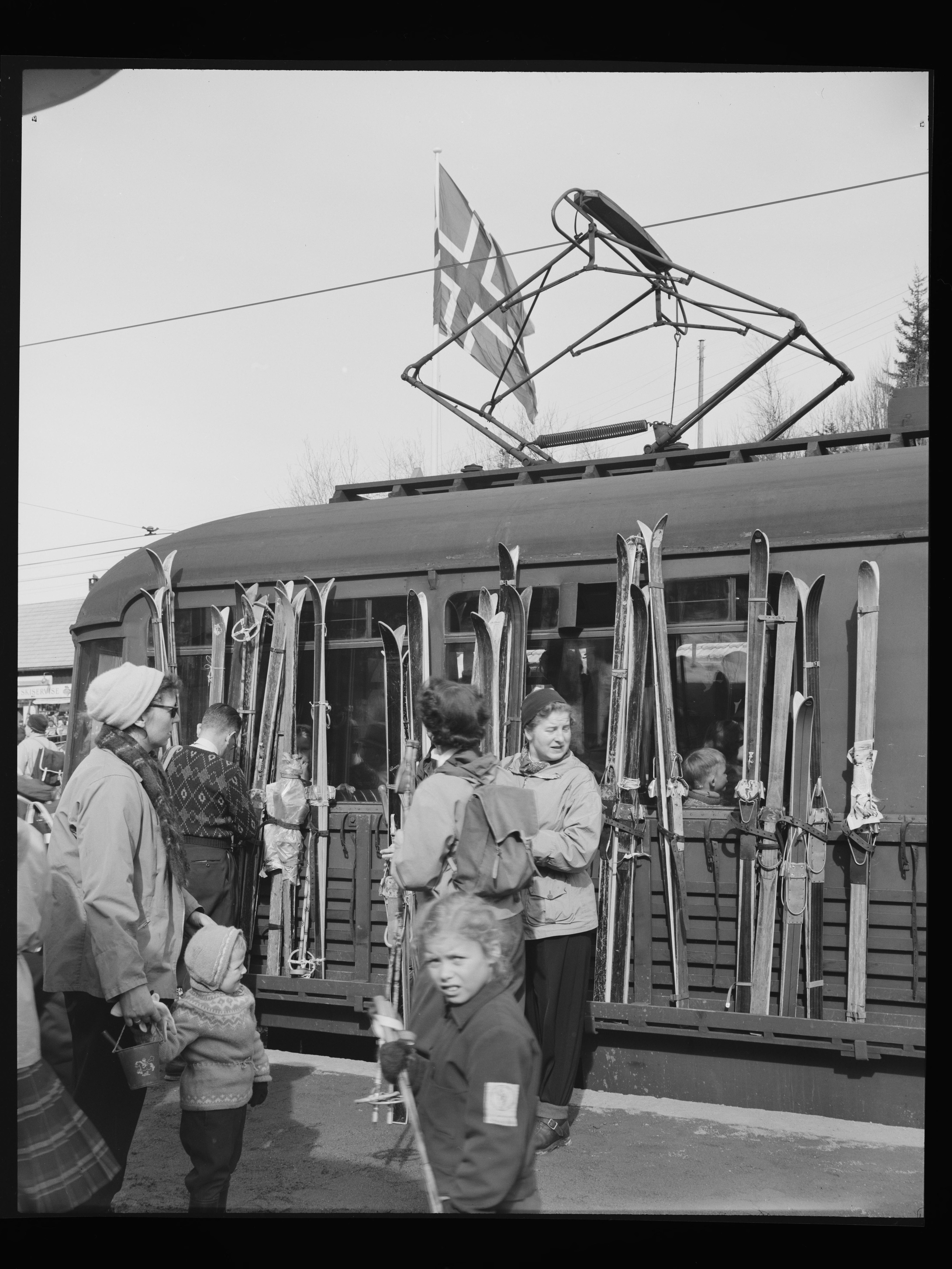 Bildet er hentet fra Nasjonalbibliotekets bildesamling Oslo,Voksenkollen, Oslo, Oslo